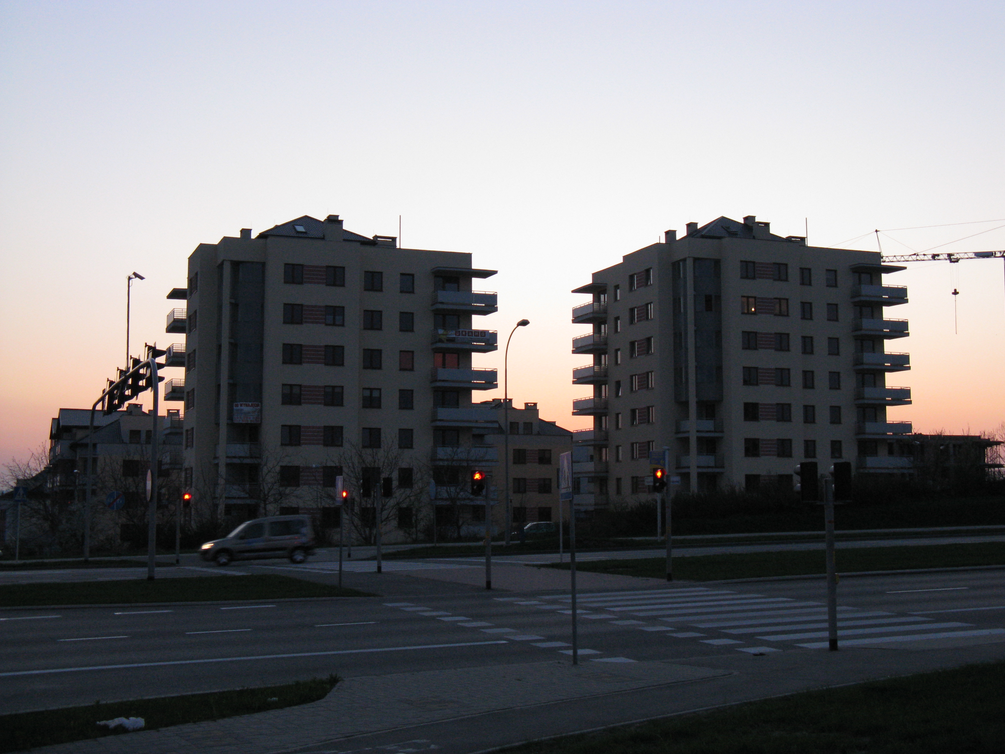 Nowe bloki na os. Mieszka I w Rzeszowie